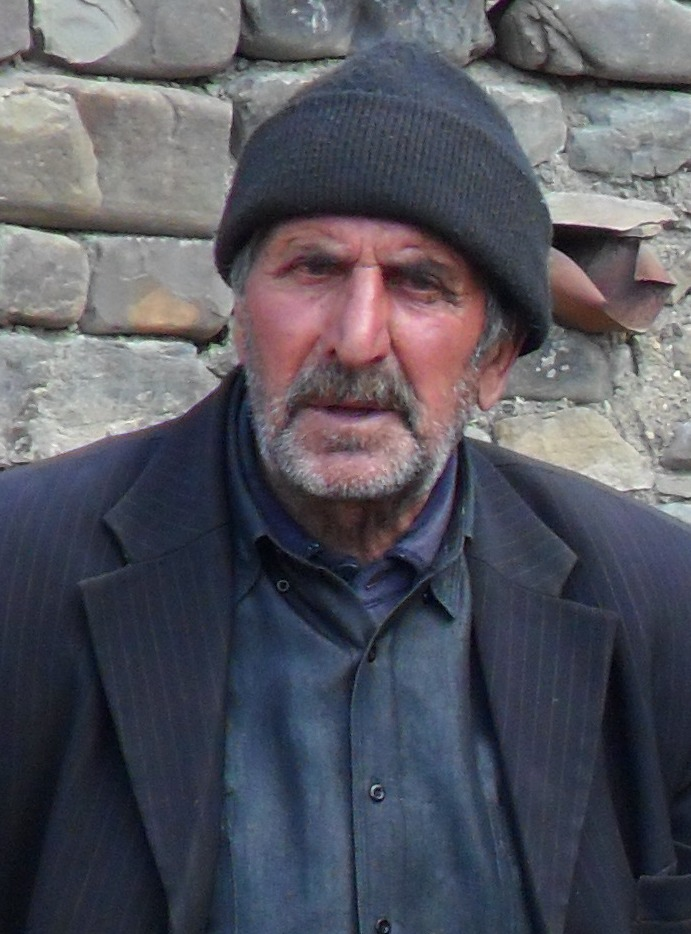 Şıxəli Muradov